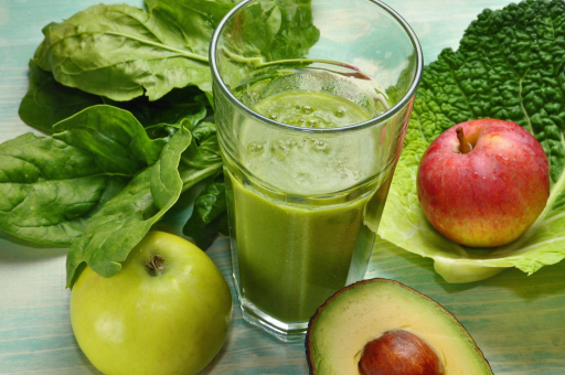 Zeigt die Zutaten für ein grünes Smoothie